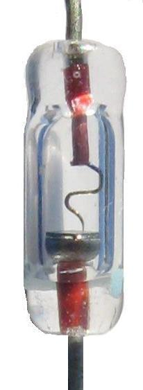 diode germanium AO85. Poste a cristal.